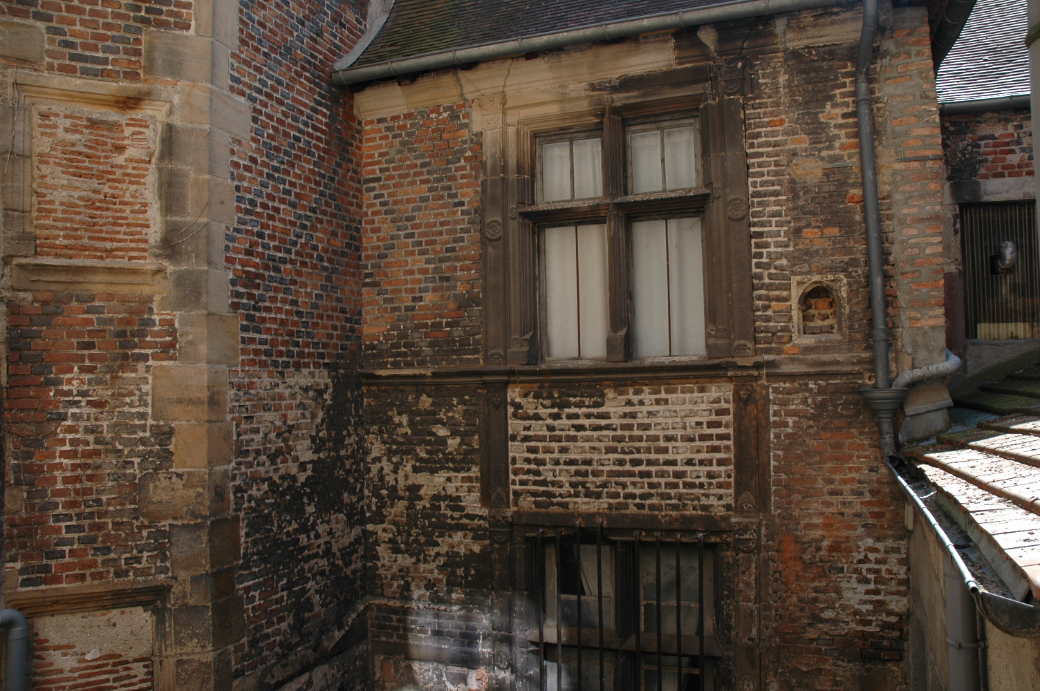 Cours des comptes de moulins du 15 siecles